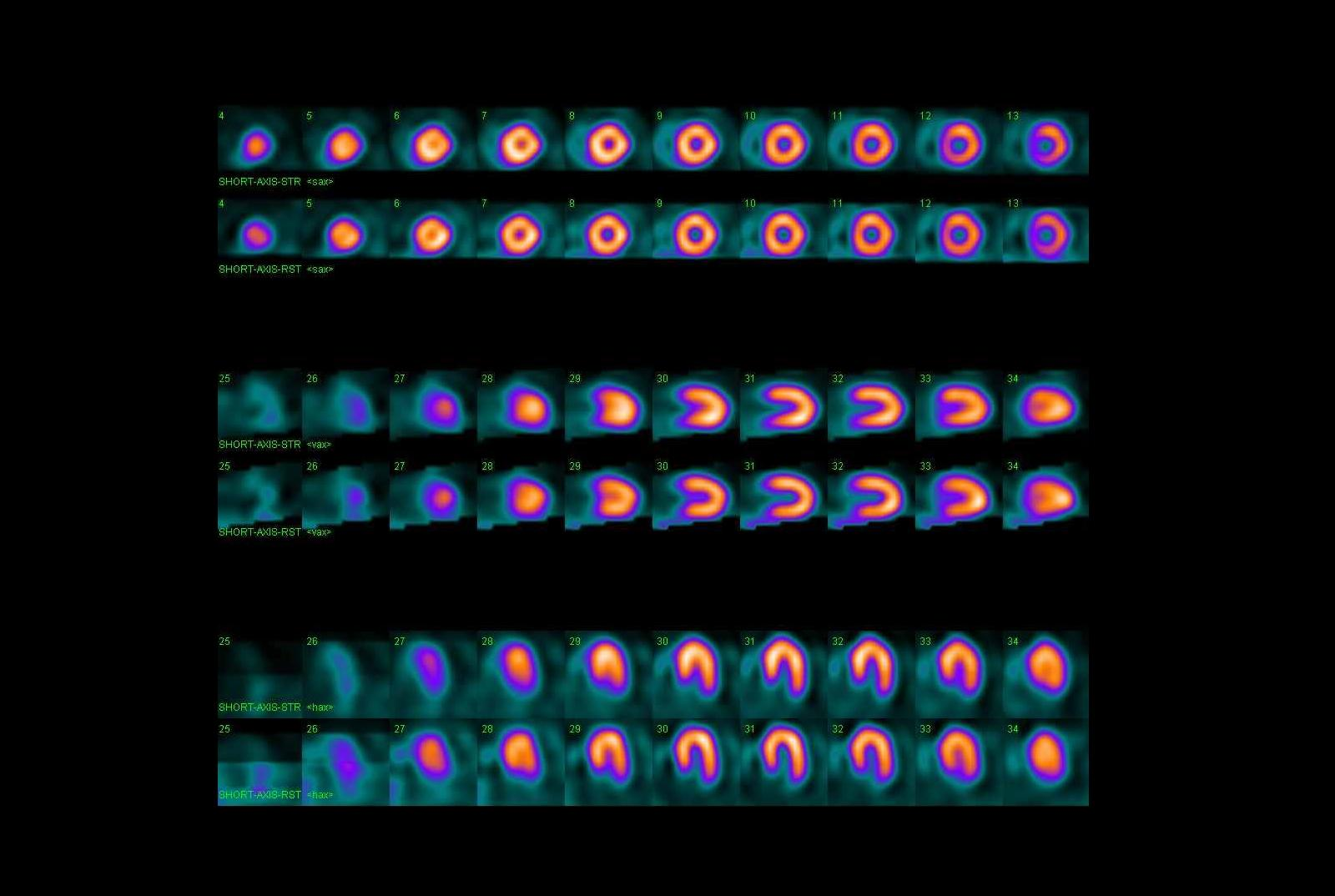 Distribucion homogenea y adecuada del trazador (99m-Tc-MIBI) en el ventriculo izquierdo